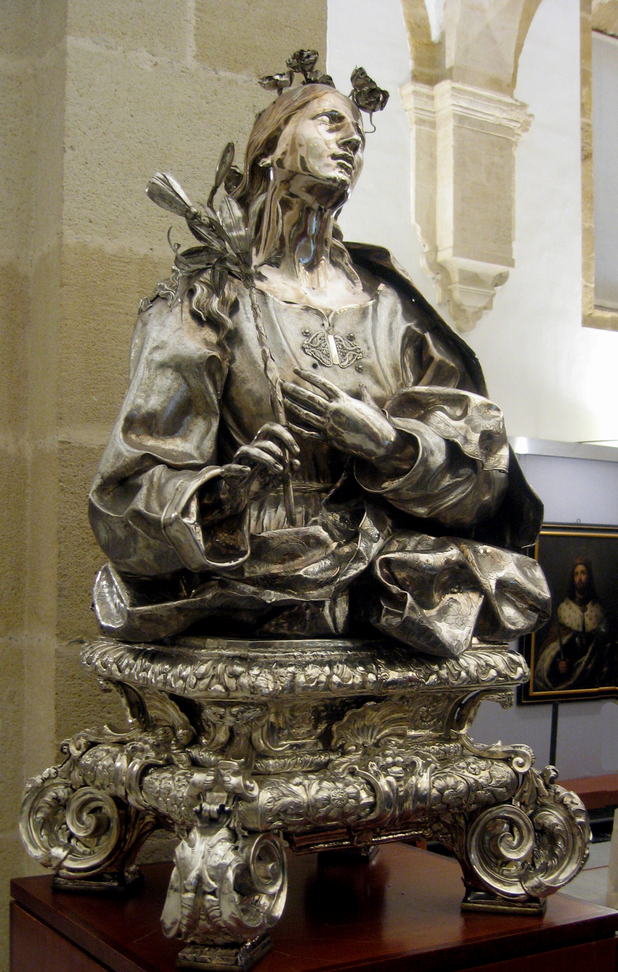 Busto-relicario de Santa Rosalía, en el tesoro de la catedral de Sevilla, (España). Fue realizado por el orfebre italiano Lorenzo Castelli y donado a la catedral de Sevilla por el arzobispo Jaime de Palafox y Cardona.